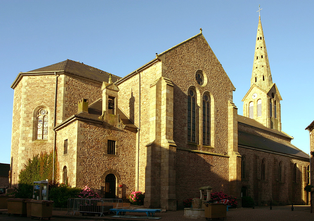 Eglise Notre Dame du Gavel